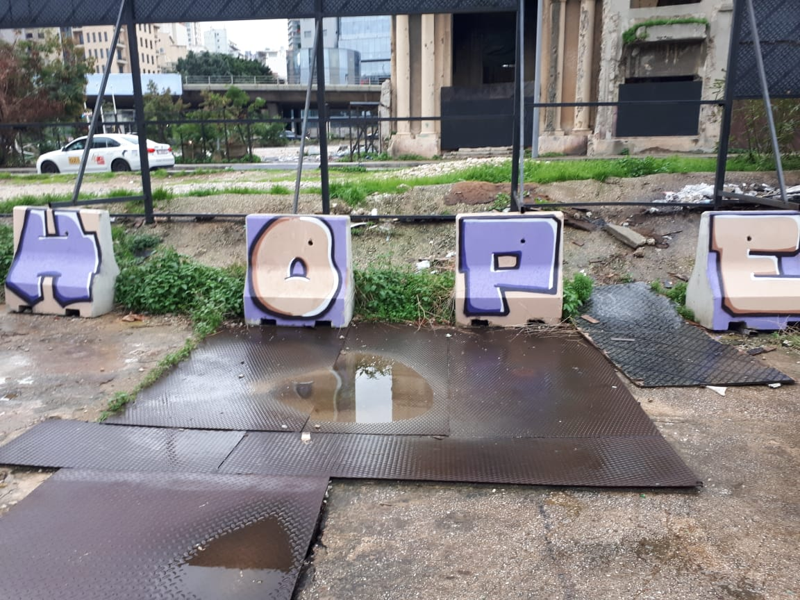 hope - Graffiti in der Beiruter Innenstadt während der Proteste im Libanon